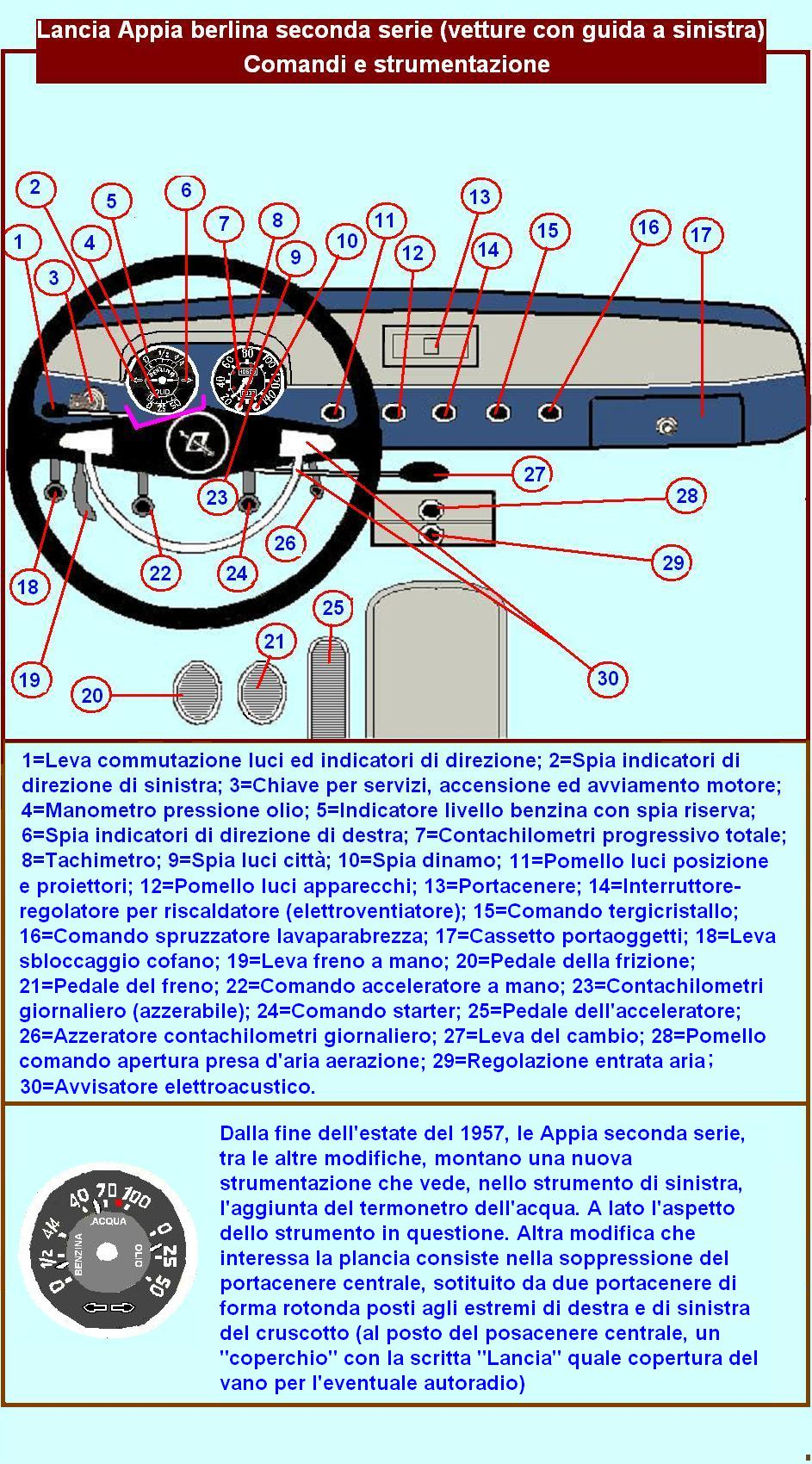 Immagine (disegno) eseguito autonomamente dal sottoscritto (Giomayo) ispirandosi e traendo le necessarie informazioni dalla rivista Auto Italiana del 30-10-1956 (pagina 36 del fascicolo numero 30)